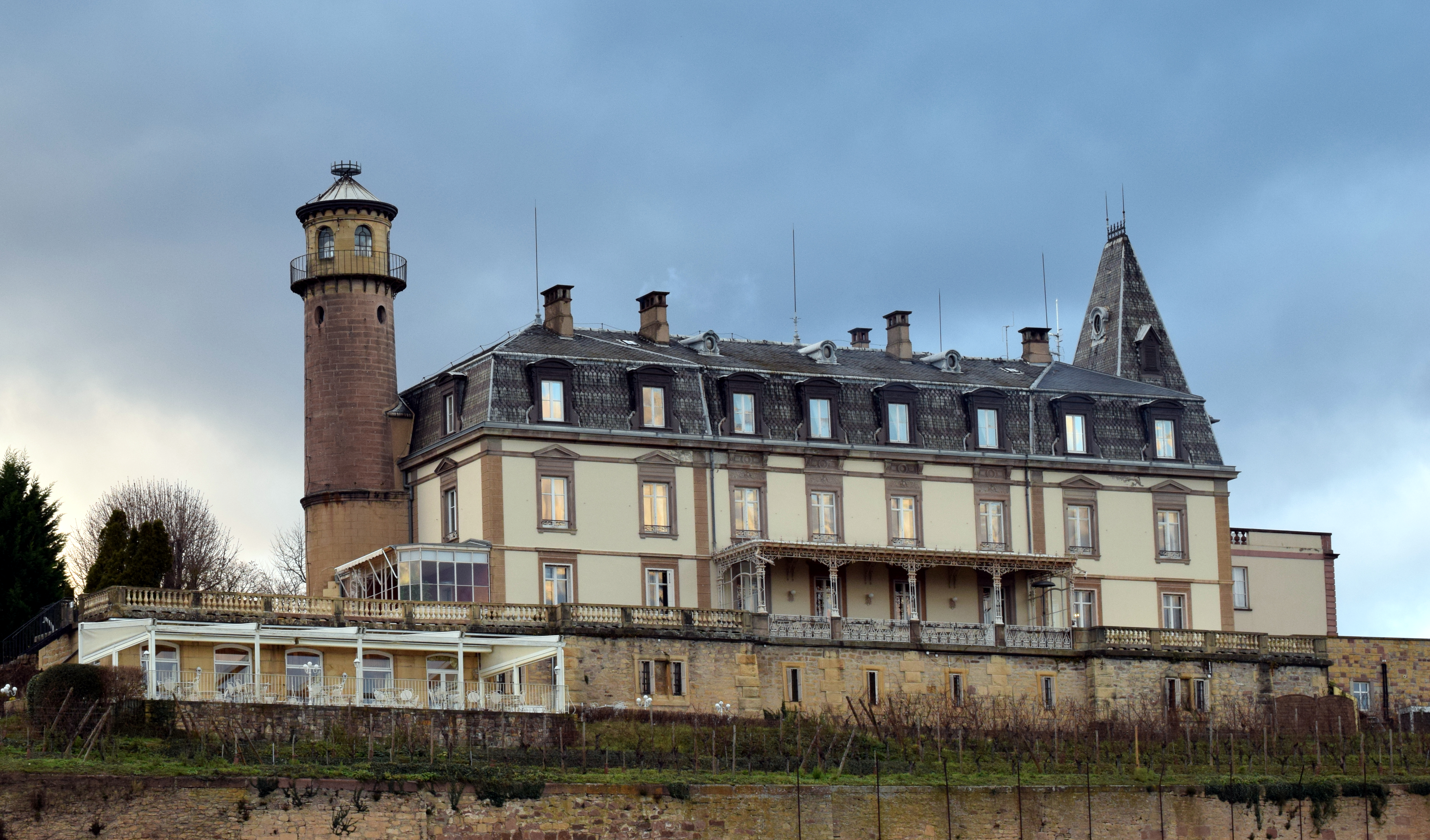 Le château d'Isenbourg à Rouffach, France